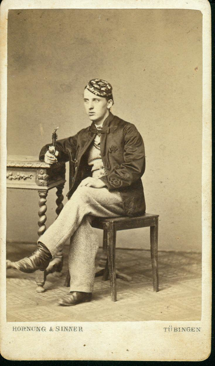 Archiv L! Teutonia Bonn von 1844 Dr. phil. Eugen Gantter, Schriftsteller